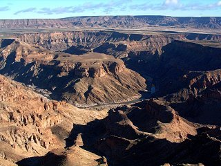 Photo personnelle, Fish River Canyon, Namibie, 2006 Licensing Catégorie:Canyon Catégorie:Namibie